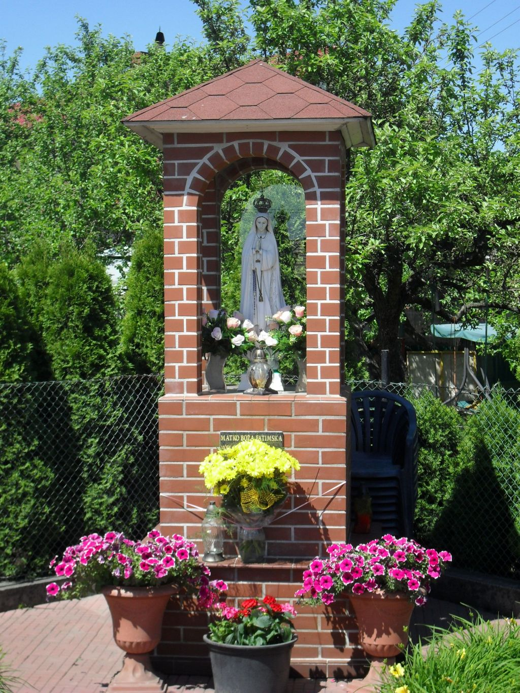 Kapliczka w Łochowicach.